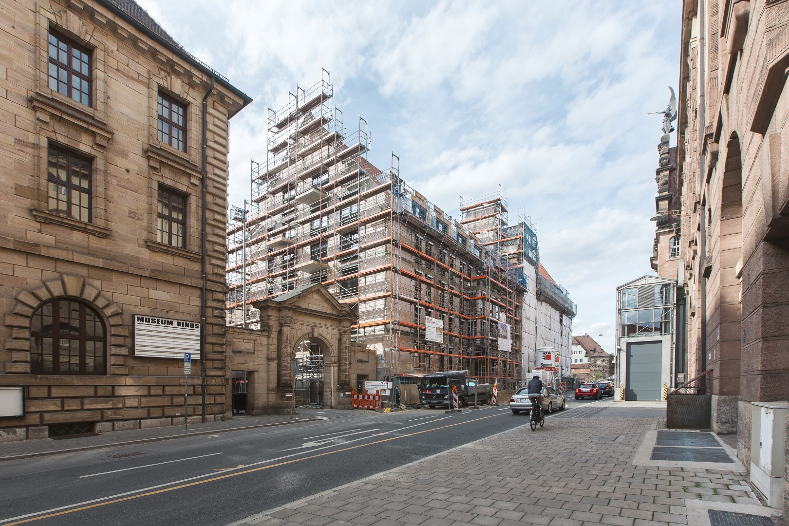 Nürnberg, Wohnanlage Opernpalais (Lessingstr. 4) im Bau.